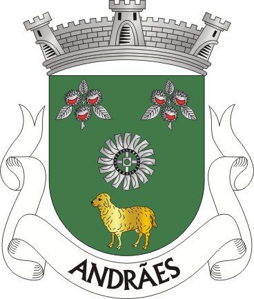 Brasão da freguesia de Andrães (concelho de Vila Real)